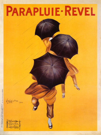 Affiche dessinée par Leonetto Cappiello pour la société Parapluie Revel en 1922.